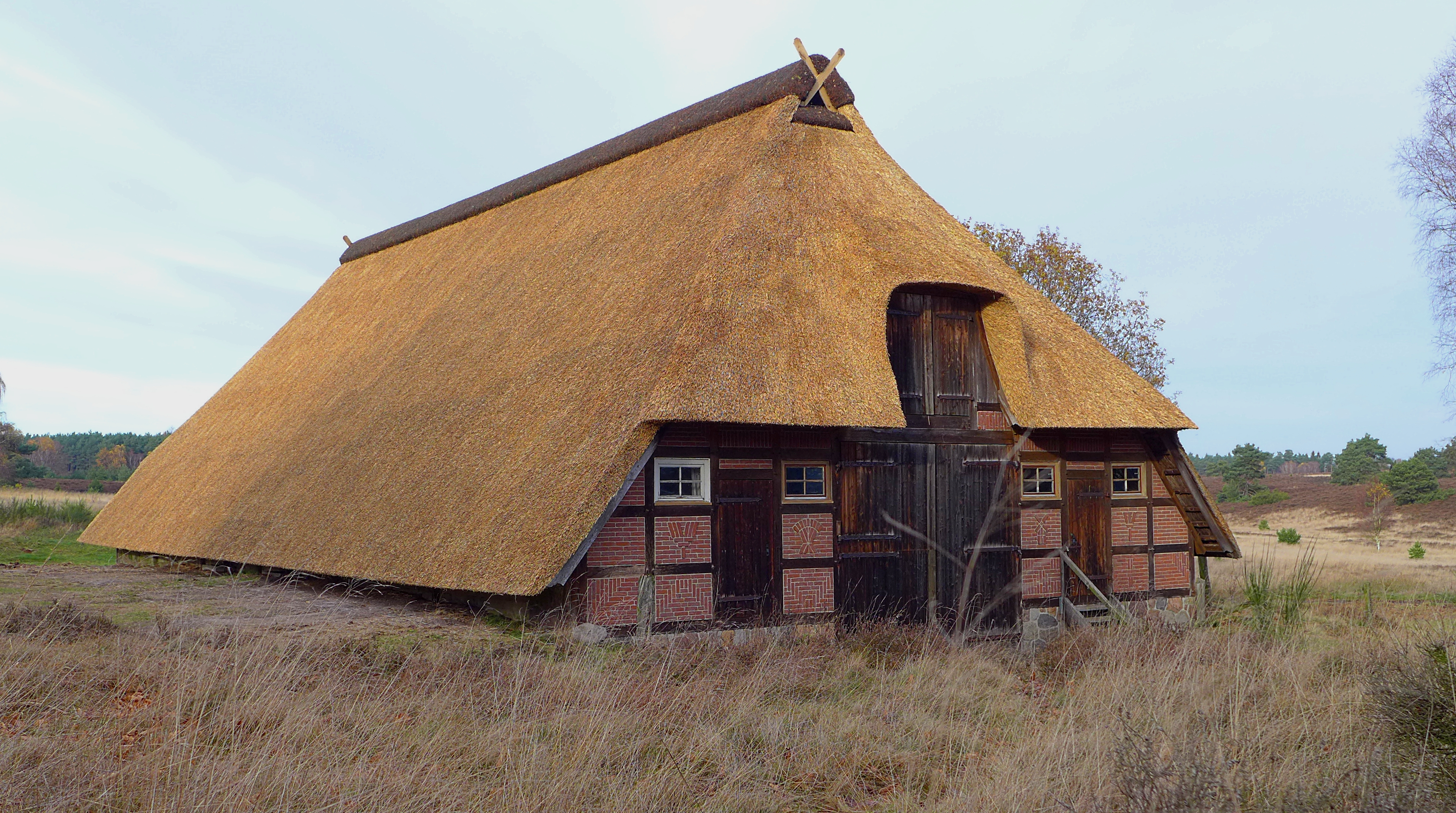 Ehemaliger Heidschnuckenstall mit Reetdach bei Timmerloh in der Lüneburger Heide, einem Ortsteil der Stadt Soltau. Heutige Nutzung des Gebäudes zur Unterstellung von Maschinen und Geräten der Kommune.